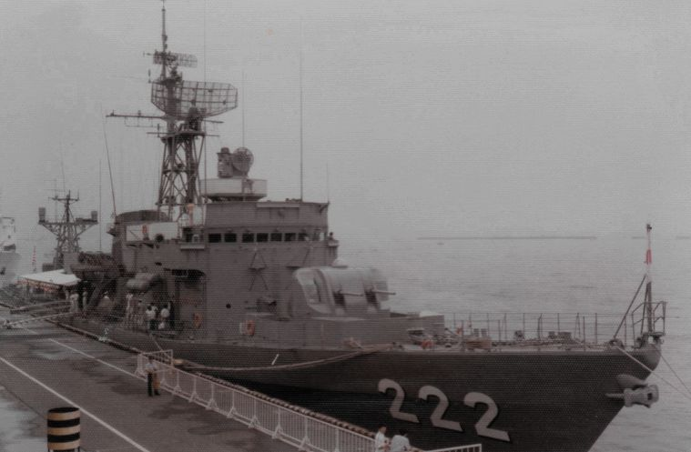 1980年７月18日、横浜港大さん橋で撮影